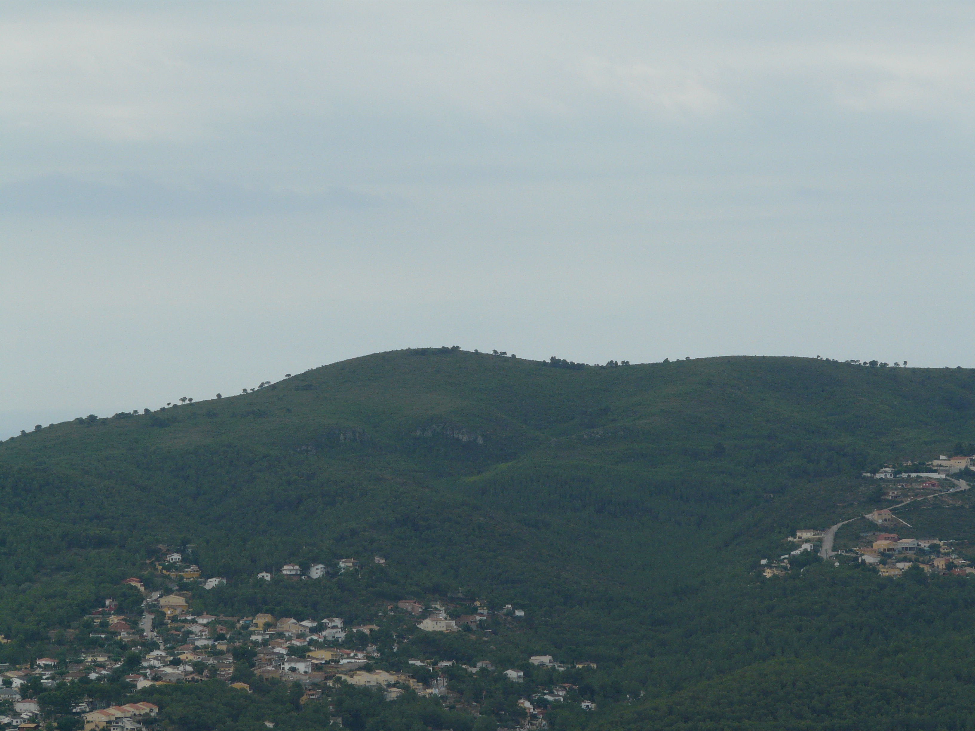 Imatges preses en una excursió al Puig Francàs des del Priorat del Penedès (la Bisbal del Penedès, Baix Penedès). Mirant cap al sud, s'hi veu el Puig de Sant Antoni al Massís de Bonastre (Baix Penedès, Tarragonès) (Bonastre, Albinyana, el Vendrell i altres). This is a a photo of a natural area in Catalonia, Spain, with id: ES510248 Object location41° 13′ 12″ N, 1° 28′ 48″ E